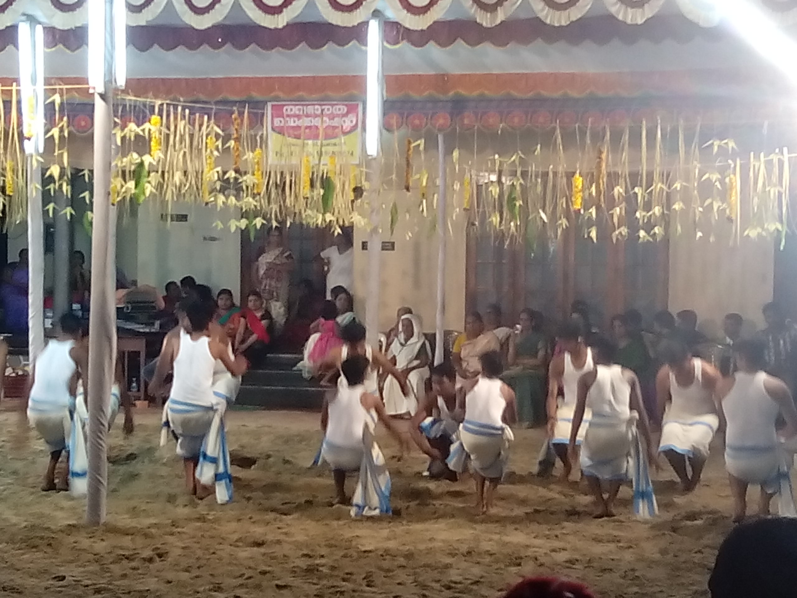 the photo of a kuthiyottam